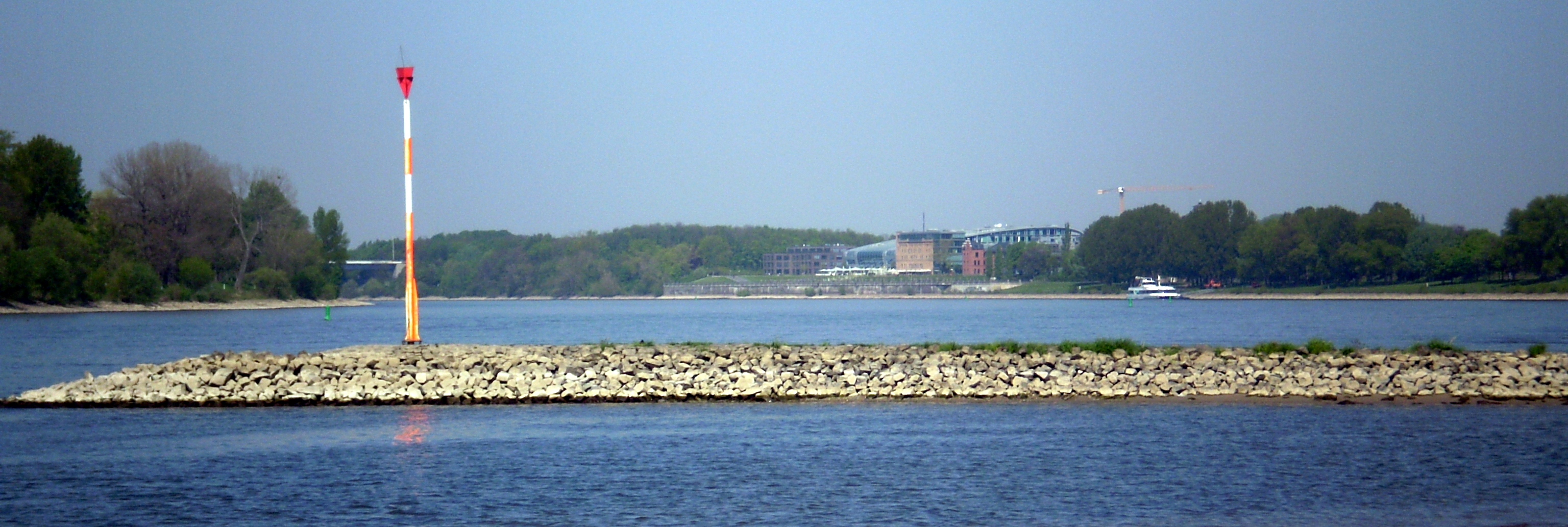 Blick vom Rheinufer zwischen Niederdollendorf/Oberdollendorf und Oberkassel zum Bonner Bogen